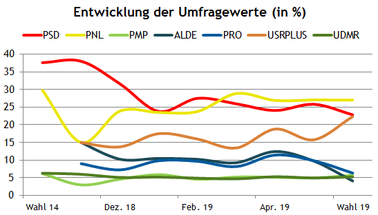 Europawahl 2019 Rumänien Umfragen